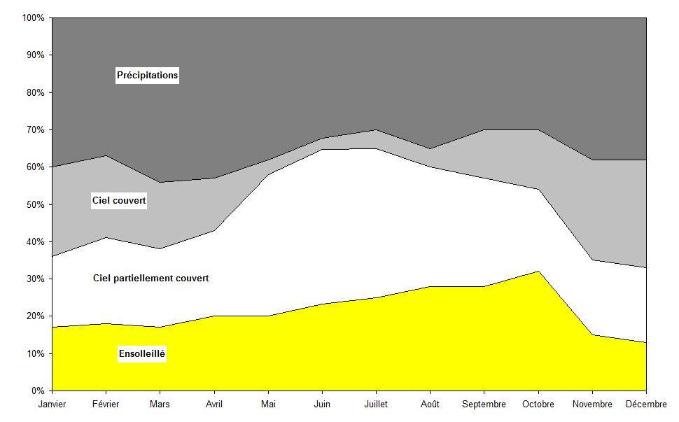 Couverture nuageuse à Delphos (Ohio - Etats-Unis)